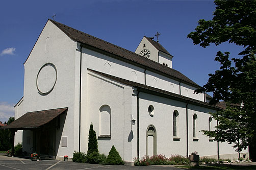 Kath. Kirche von Oberwil